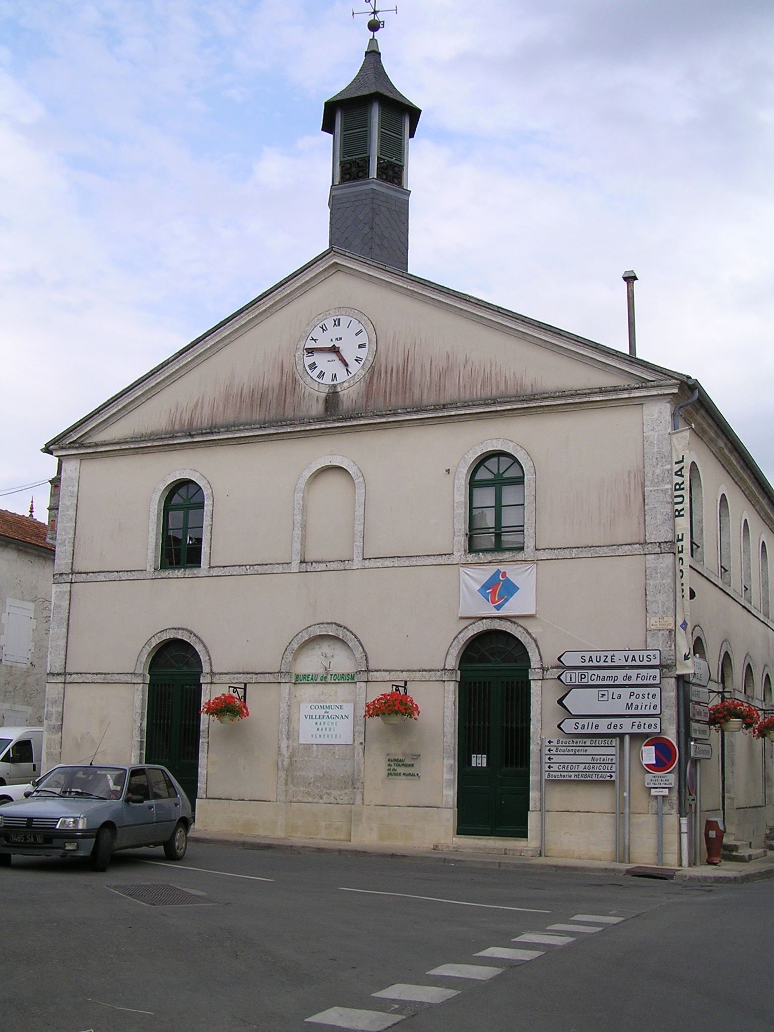 ancienne halle aux grains de Villefagnan